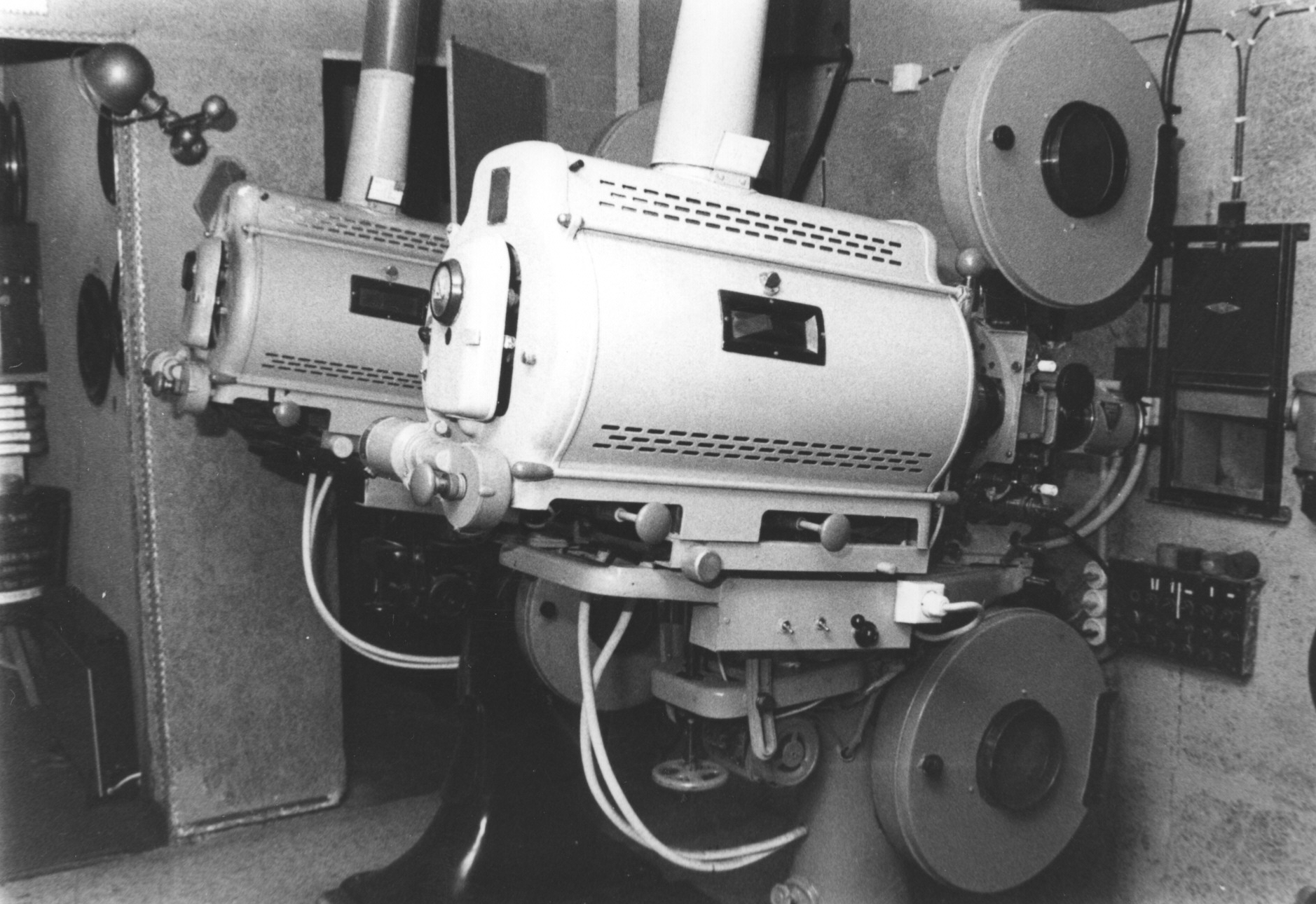 Kursaal - Bauer Projekteren